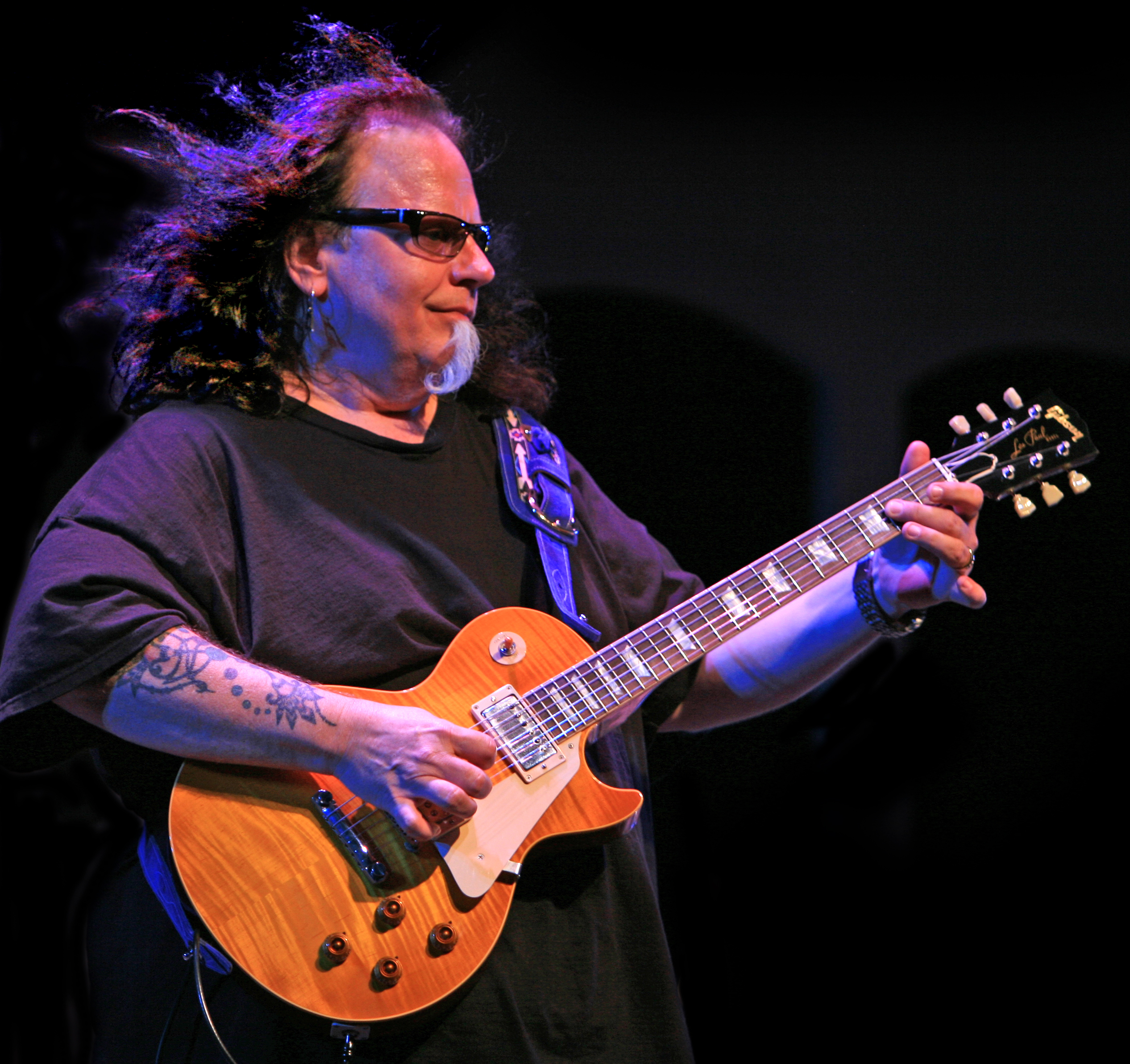 Smokin' Joe Kubek & Bnois King